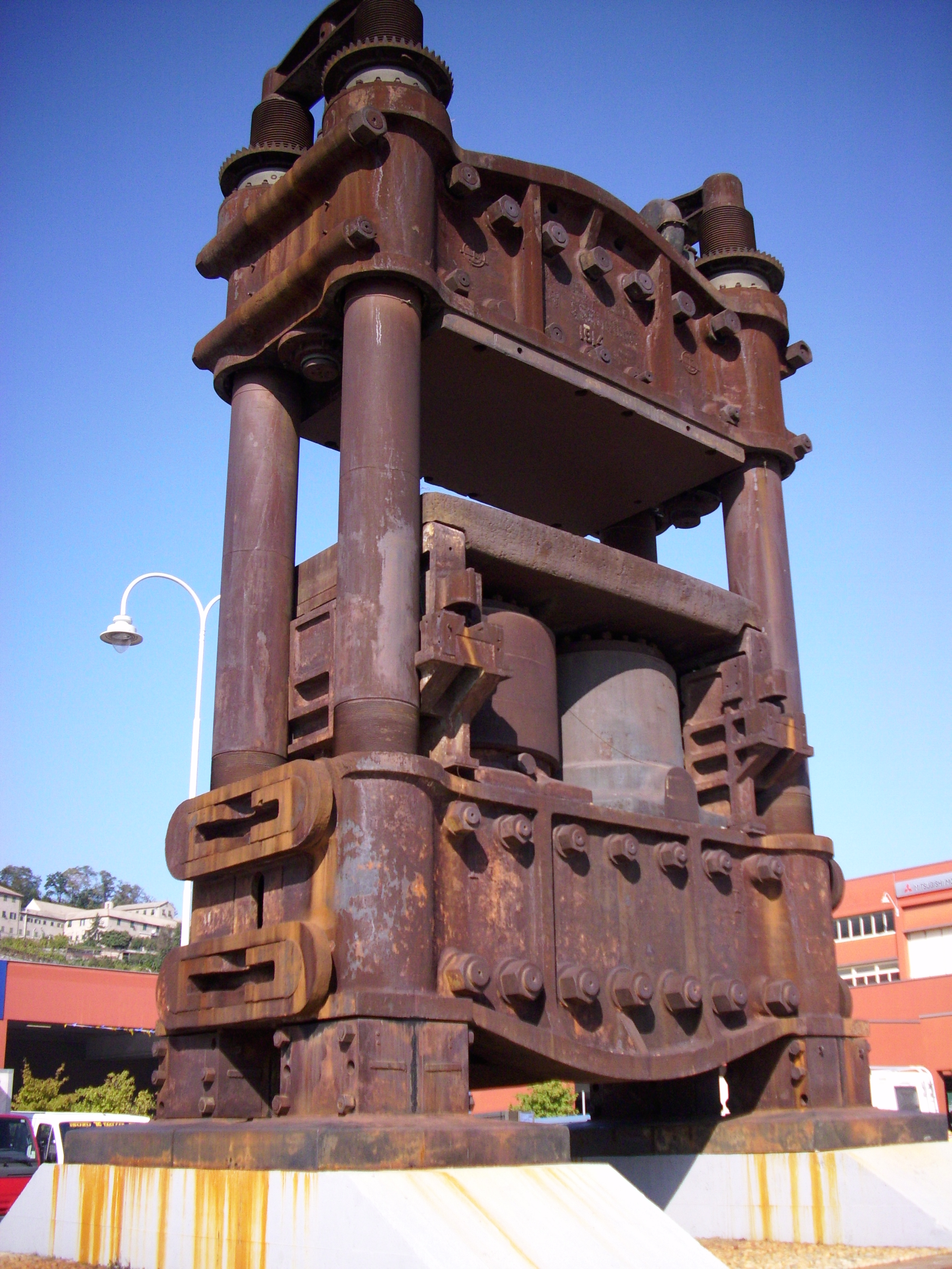 Pressa delle ex acciaierie presente nell'area Campi (Cornigliano).